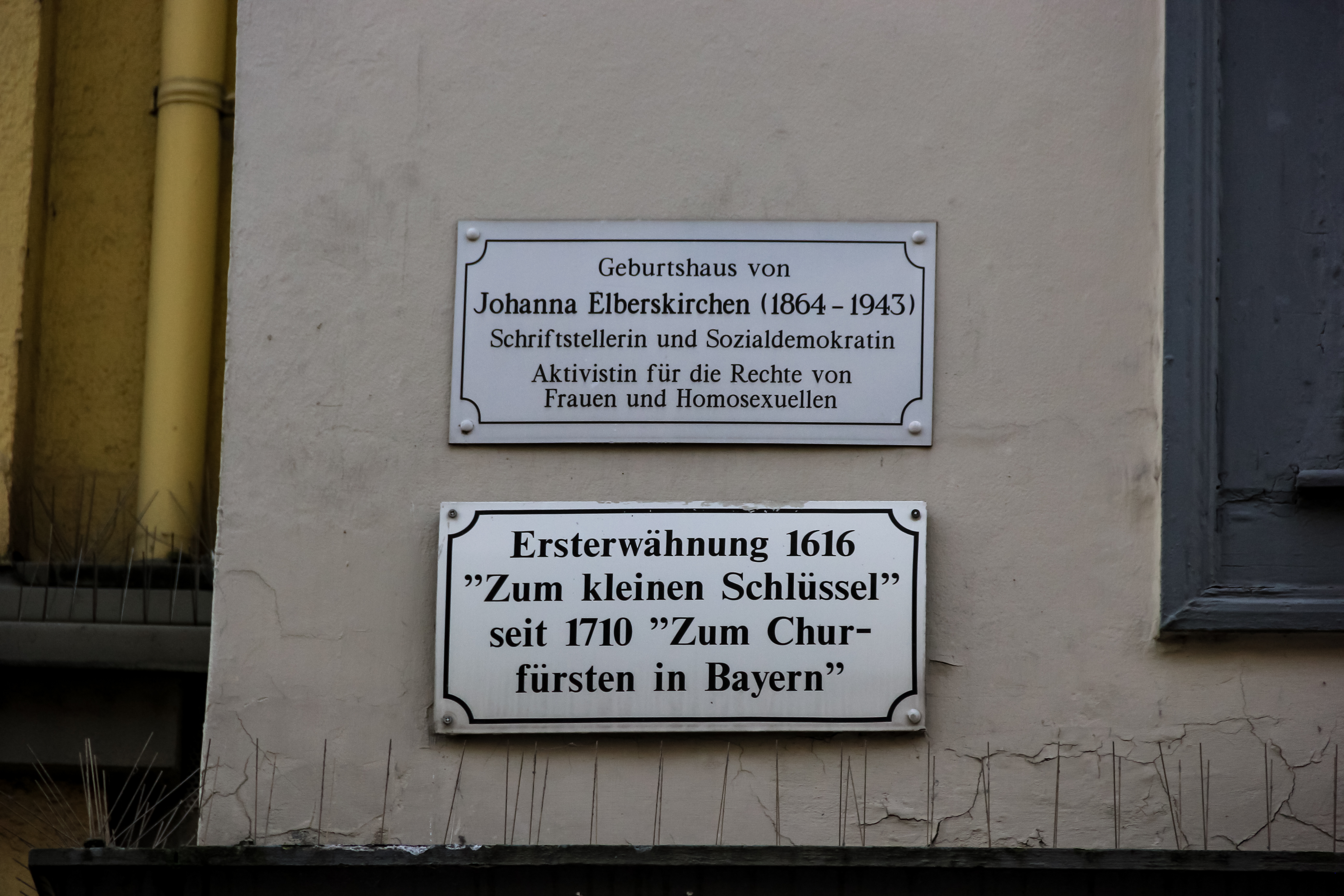 Bonn, Sternstraße 37